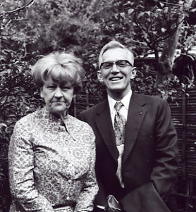 Brigitte D'Ortschy und Father Thomas Hand